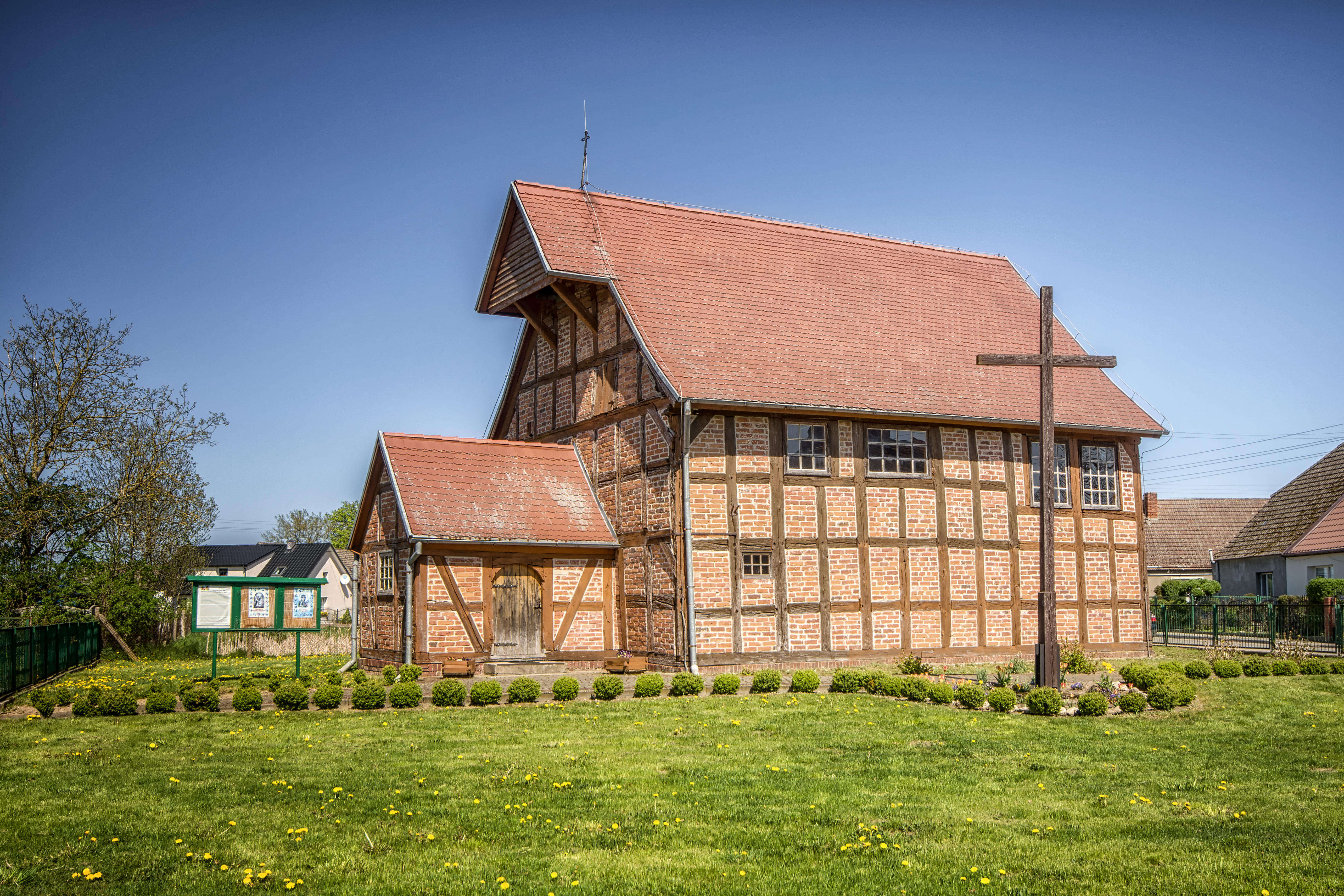 Ciećmierz, kościół ewangelicki, ob. rzym.-kat. fil. p.w. Zwiastowania NMP, 1604, XVIII